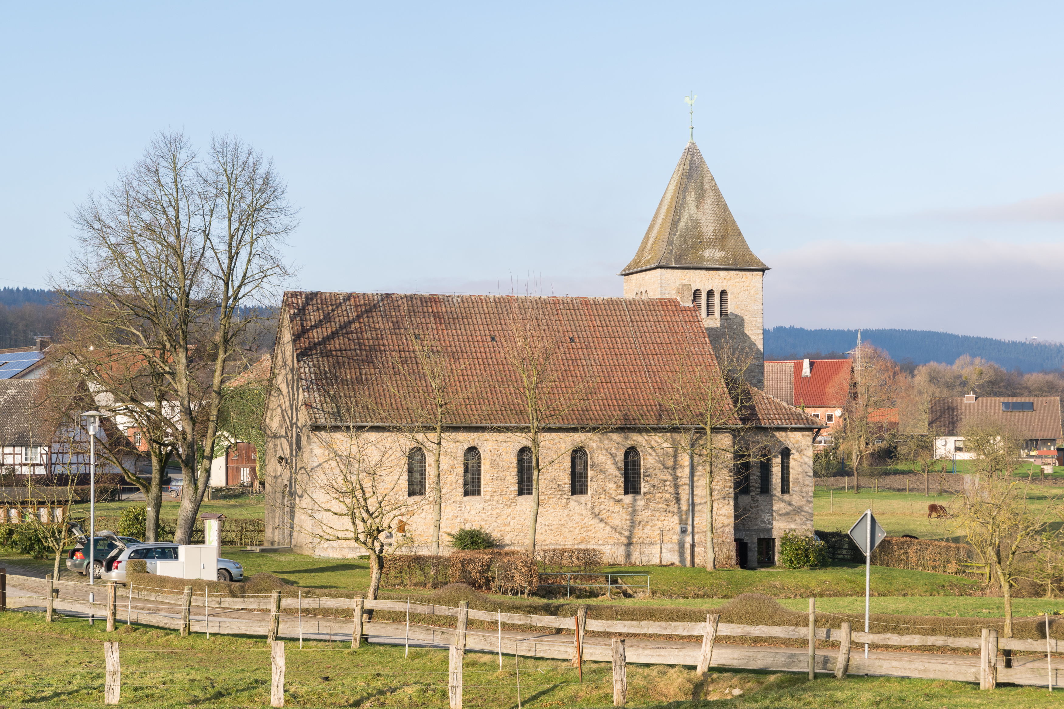 St. Johannes Baptist in Grevenhagen, Filialkirche von St. Dionysius in Steinheim-Sandebeck